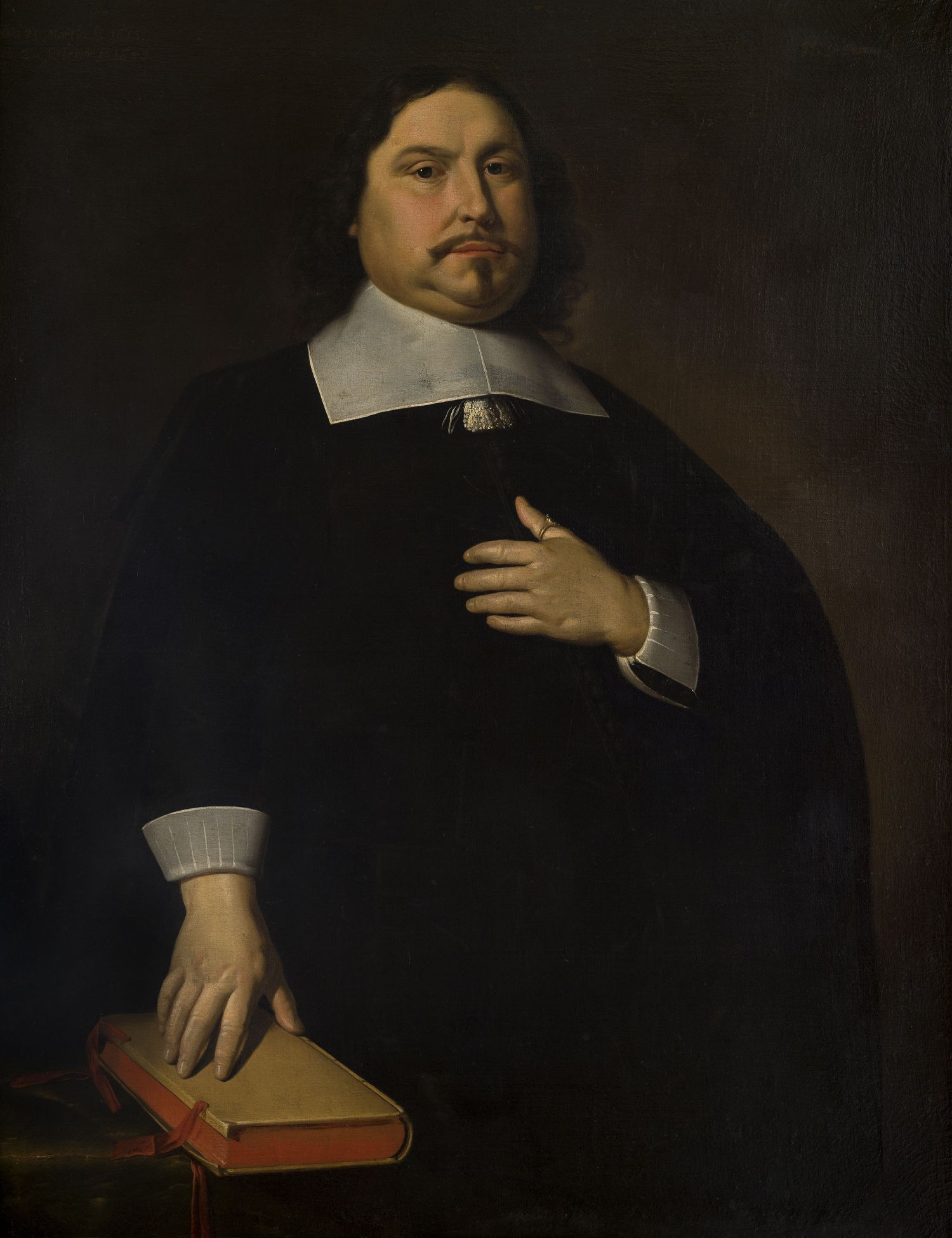 Catechisatielokaal: portret van Burgemeester G.ten Berge door Stomme